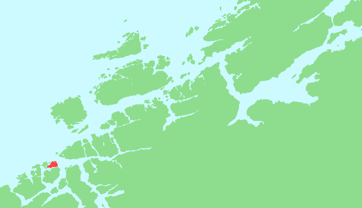 Locator map of Nordlandet, Møre og Romsdal, Norway